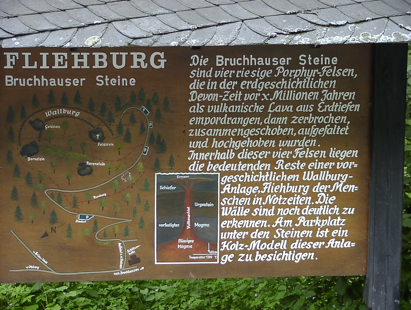 Tafel „Bruchhauser Steine" am unteren Parkplatz